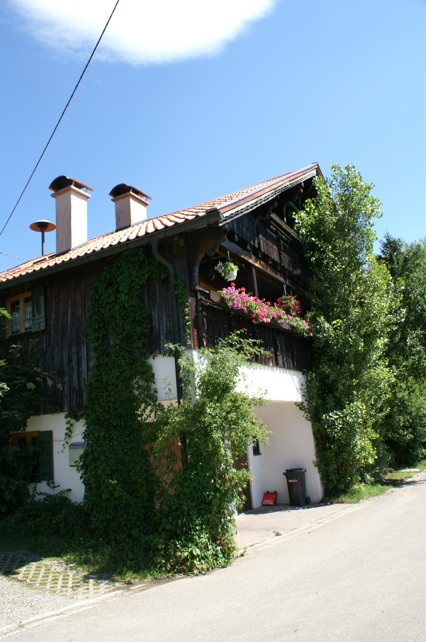 Hintere Schöne 4 in Rieden am Forggensee